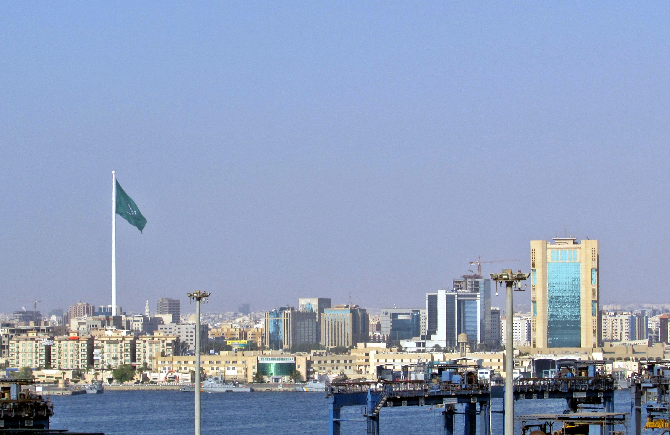 Flaggenmast von Dschidda/Jeddah